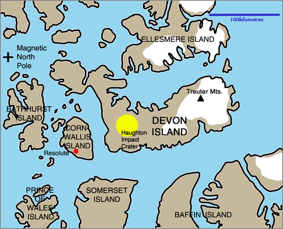 Devon Island region